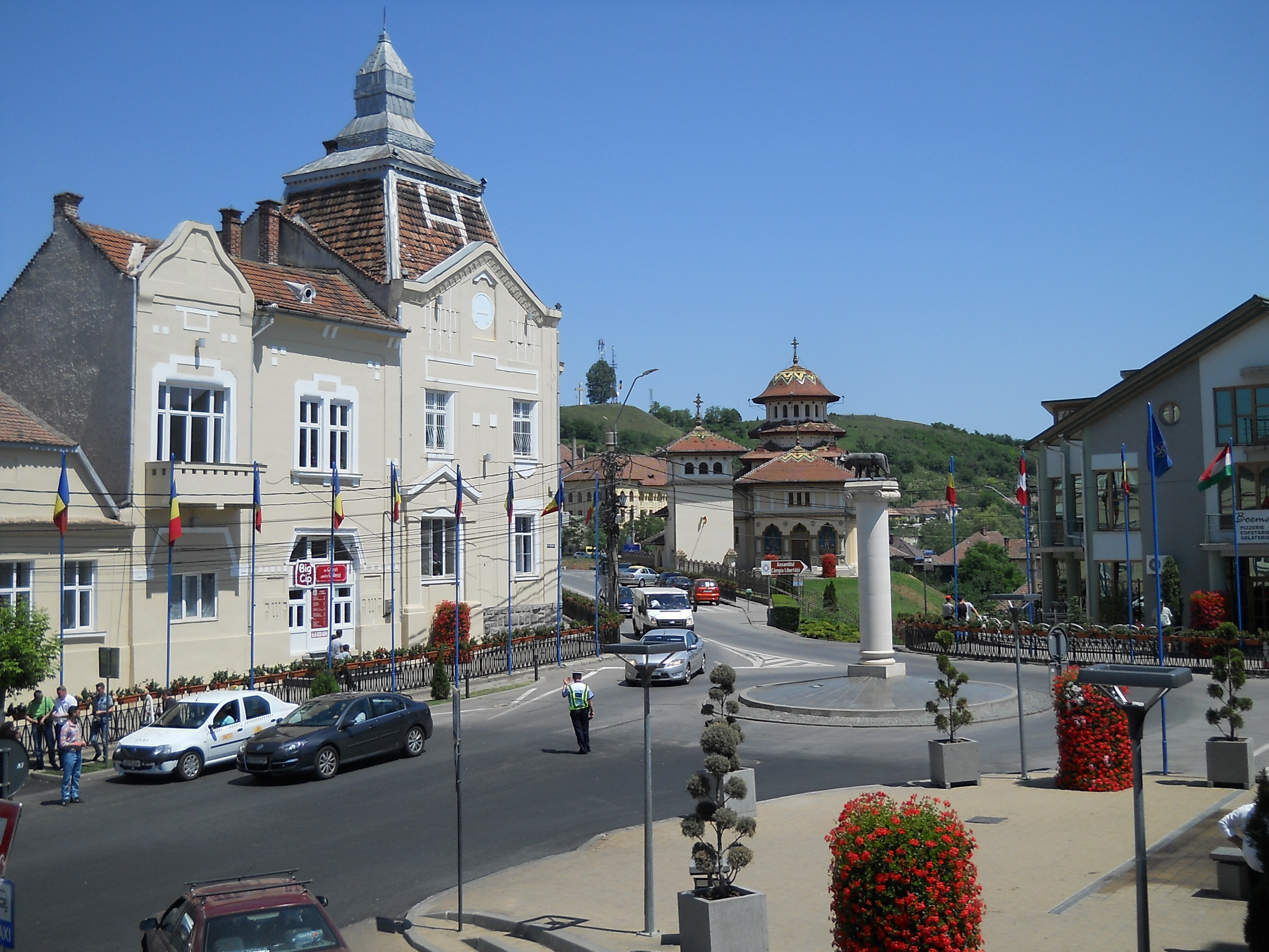 vedere din Blaj